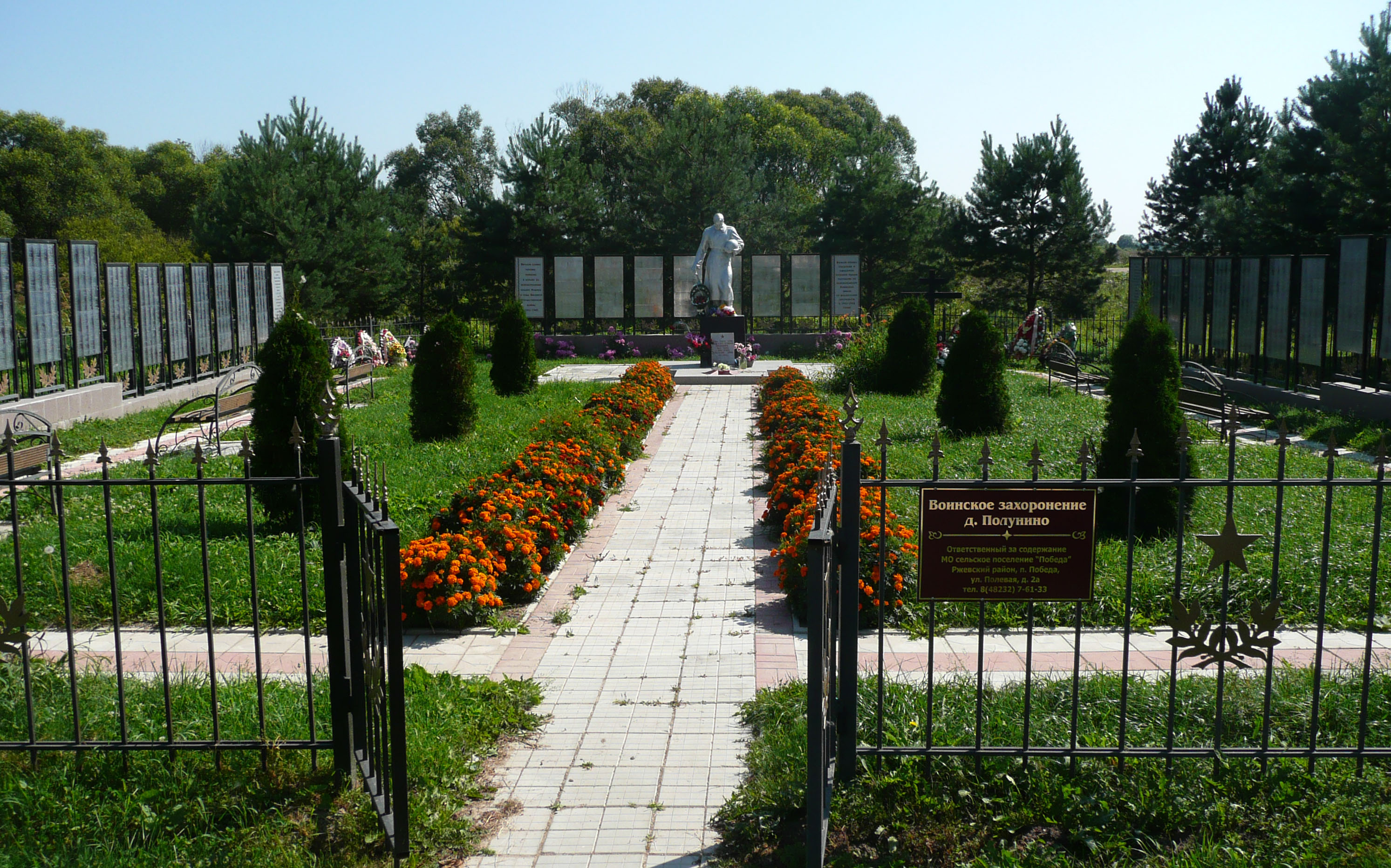 Новый мемориал в Полунино